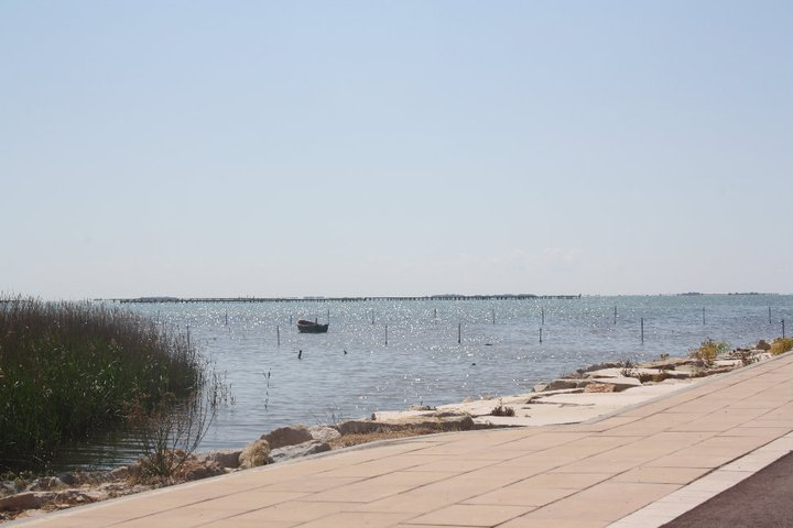 Paisaje de La Ràpita.